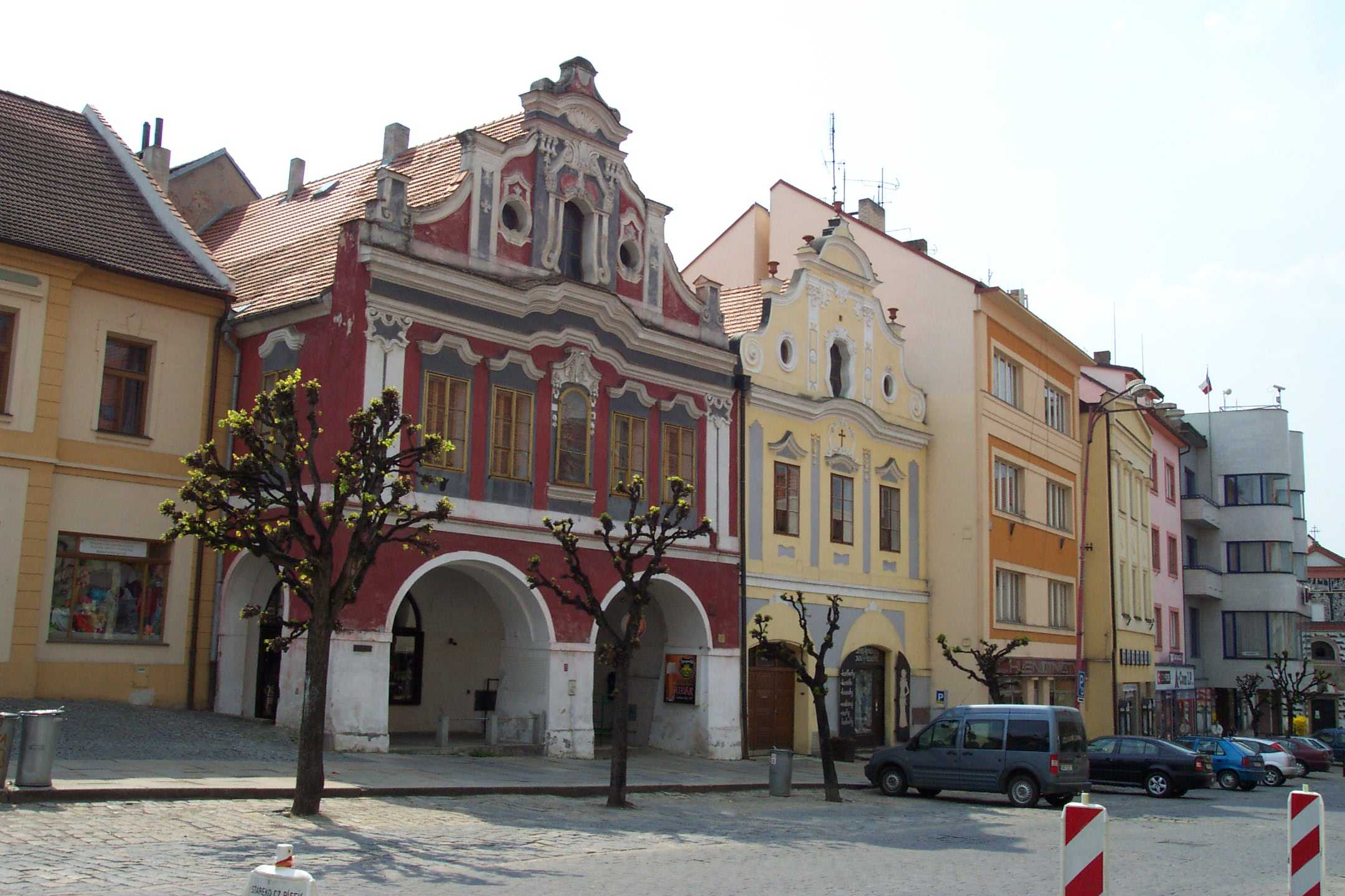 Baroque houses in center of city Písek, Czech republic - Barokní domy v centru Písku